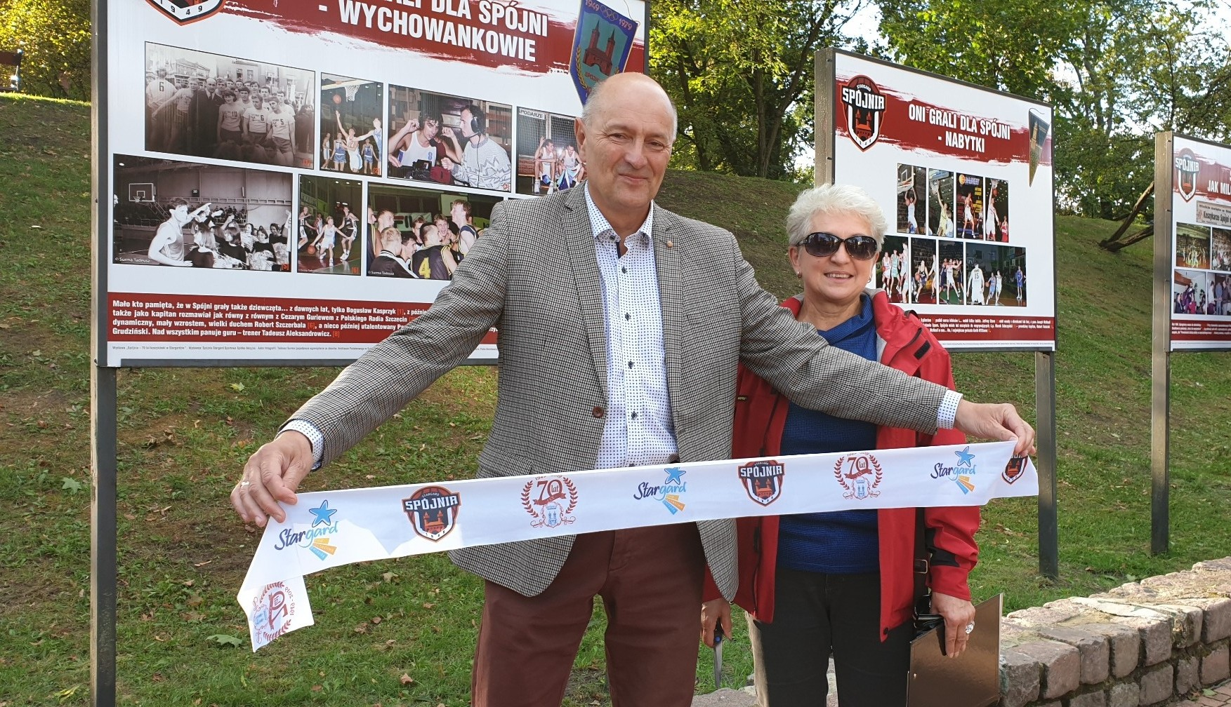 Wystawa fotograficzna na 70-lecie